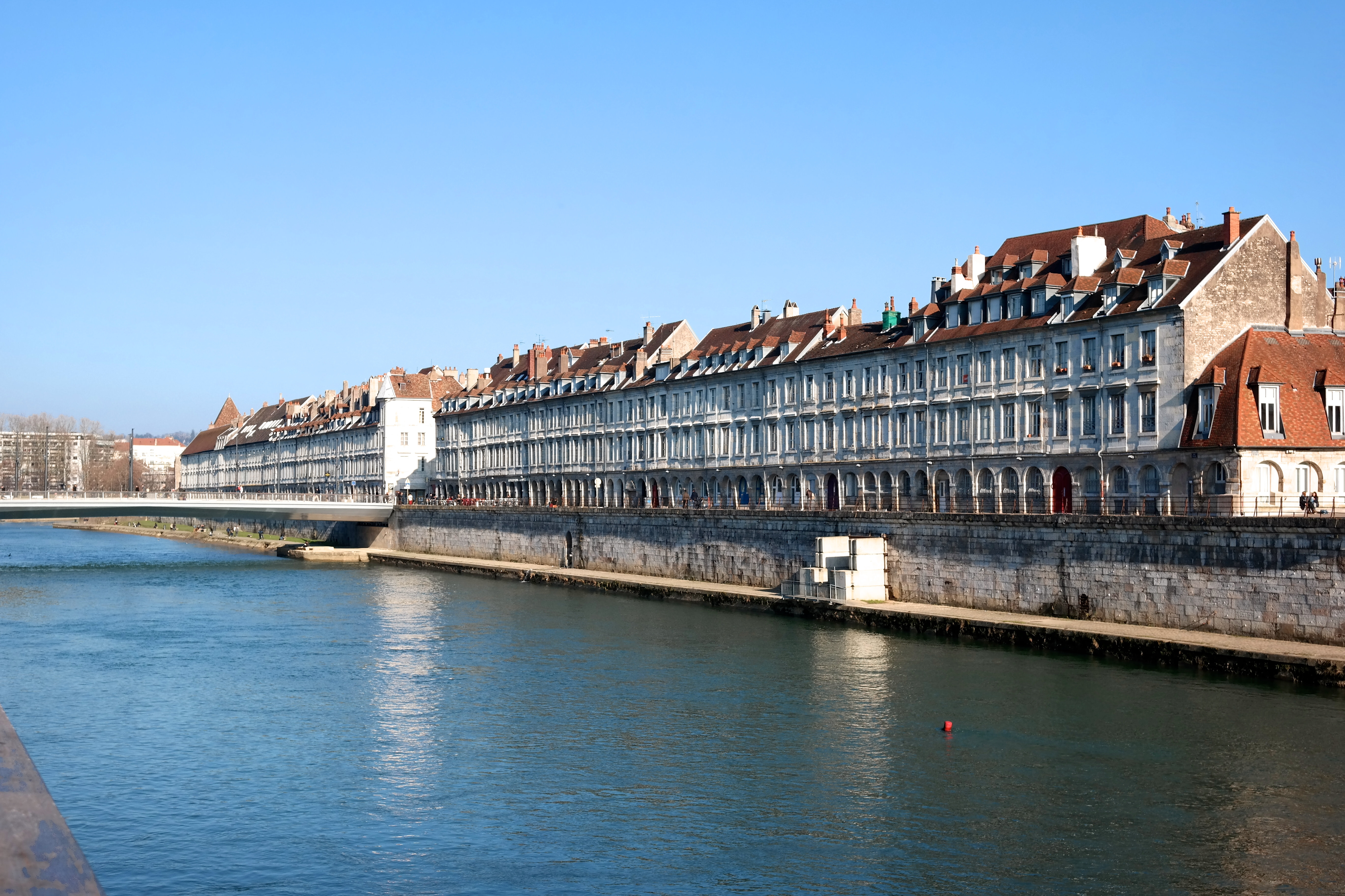 Quais Vauban